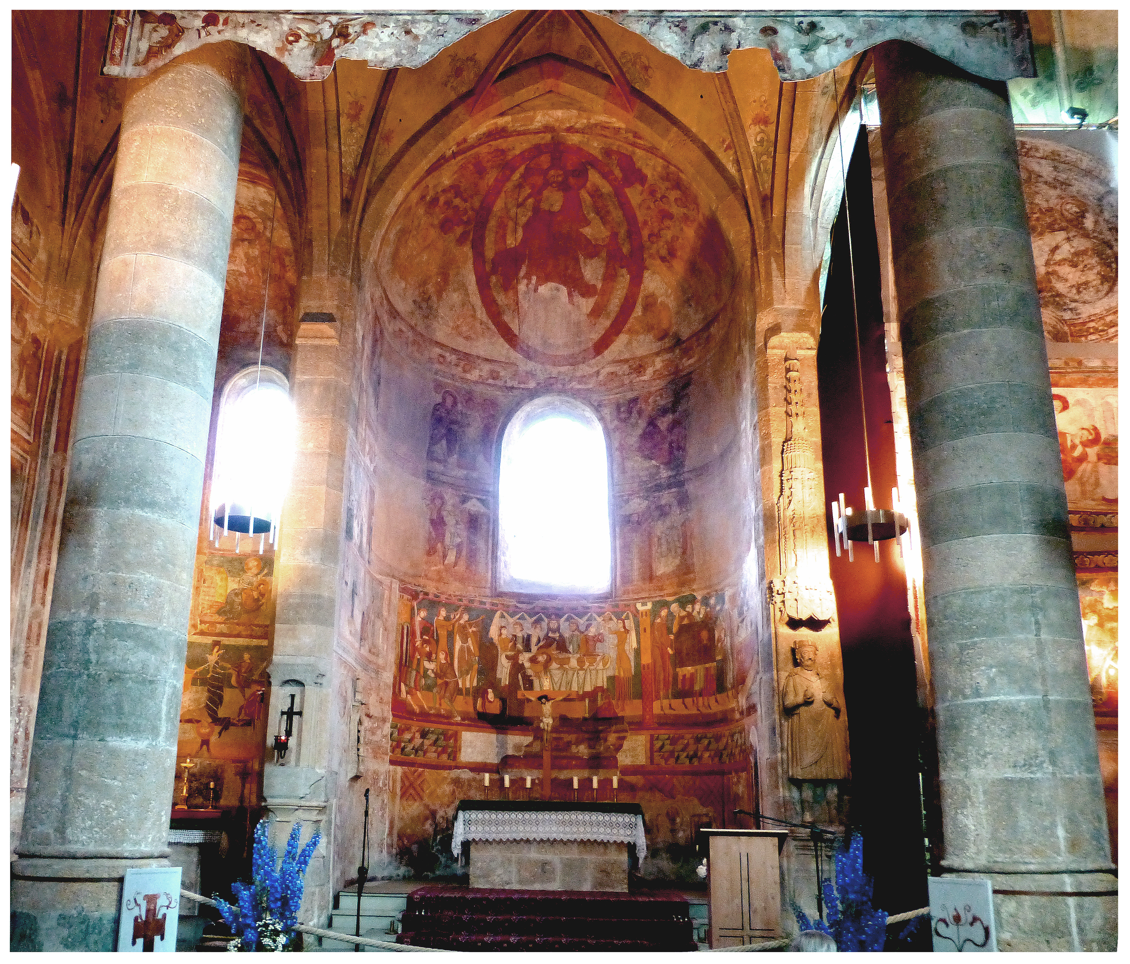 A Szent János apátsági kolostortemplom Karoling-kori freskói (Müstair, Svájc)